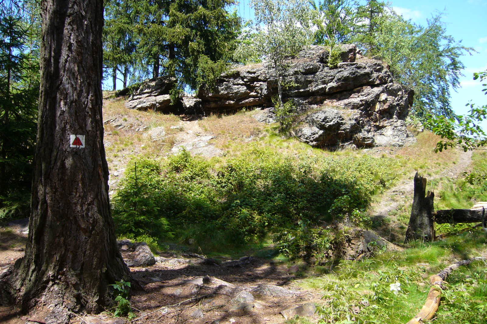 Celkový pohled přes příkop